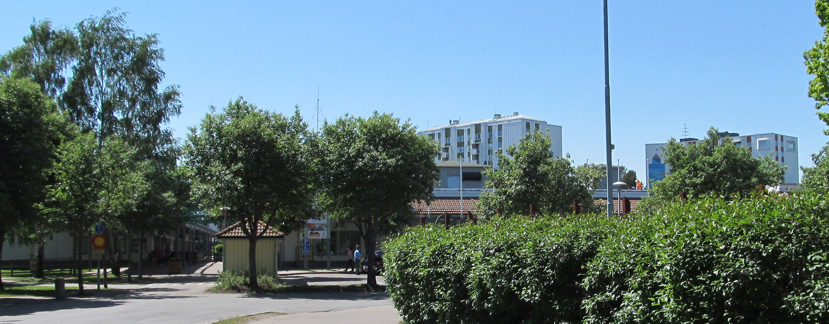 Krisitnebergs centrum, Oskarshamn.